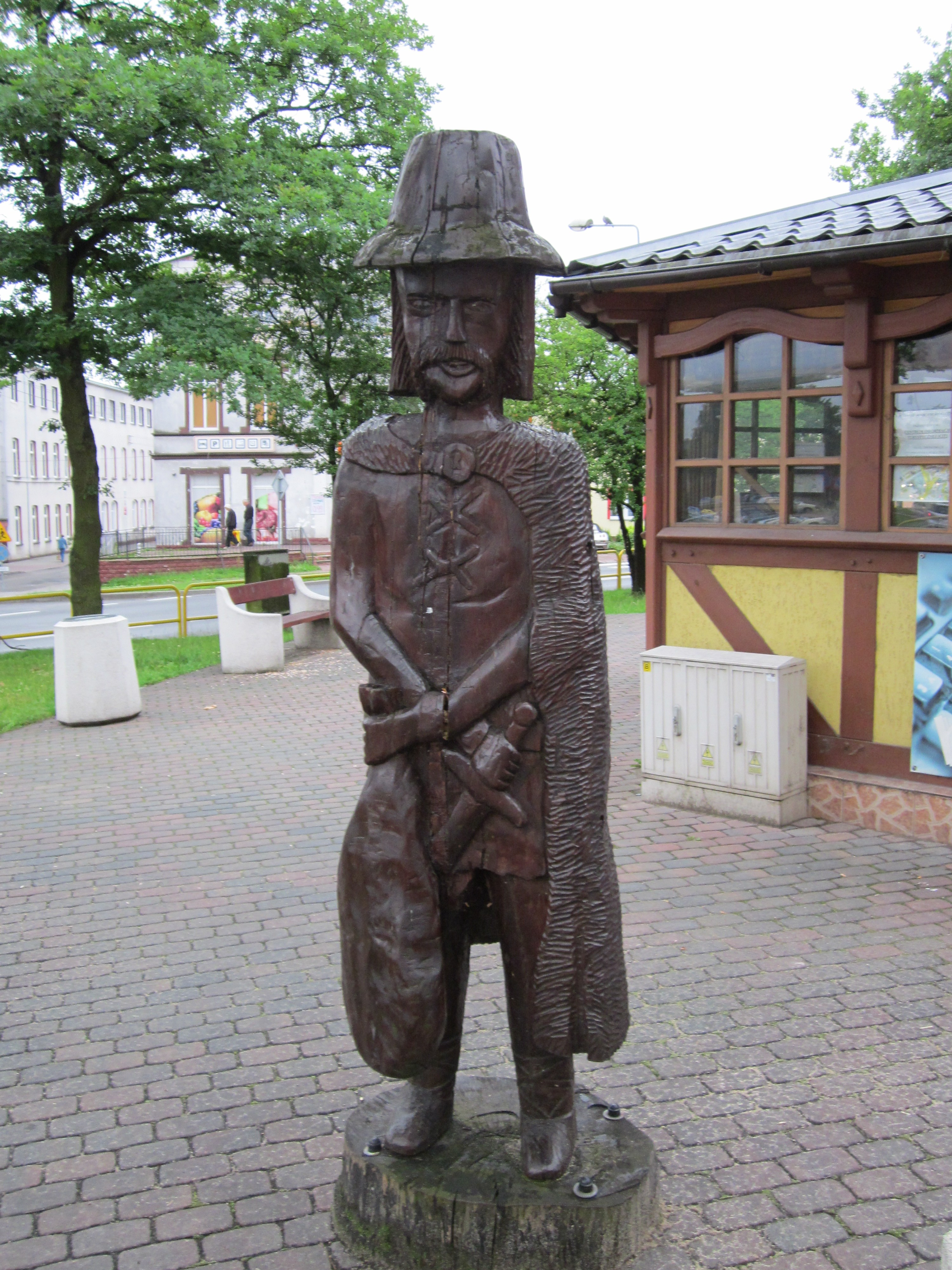 Rzeźba ta znajduje się u zbiegu ul. Armii Krajowej oraz Kazimierza Wielkiego